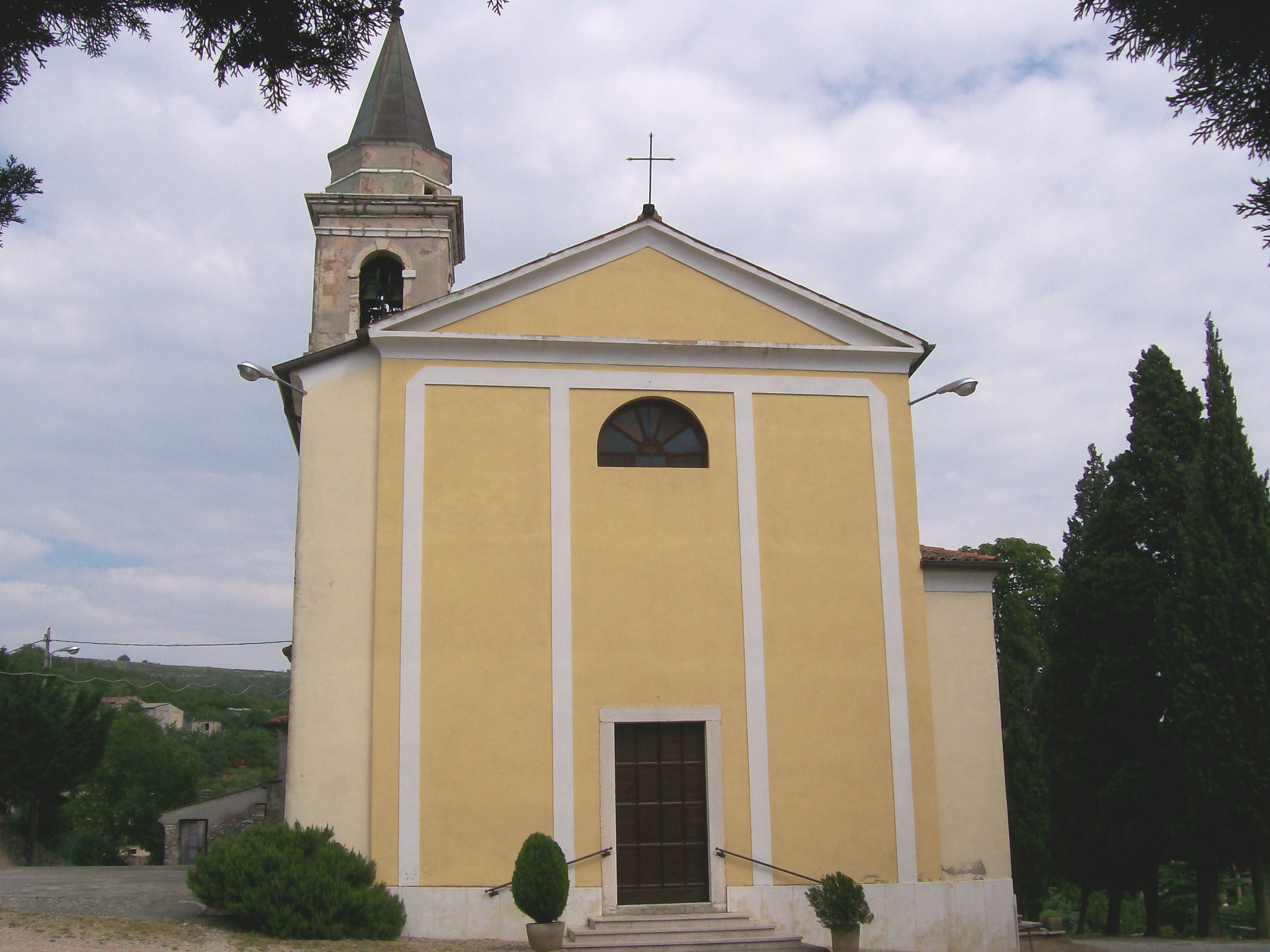 Chiesa parrocchiale di San Bernardo Abate in Campiano